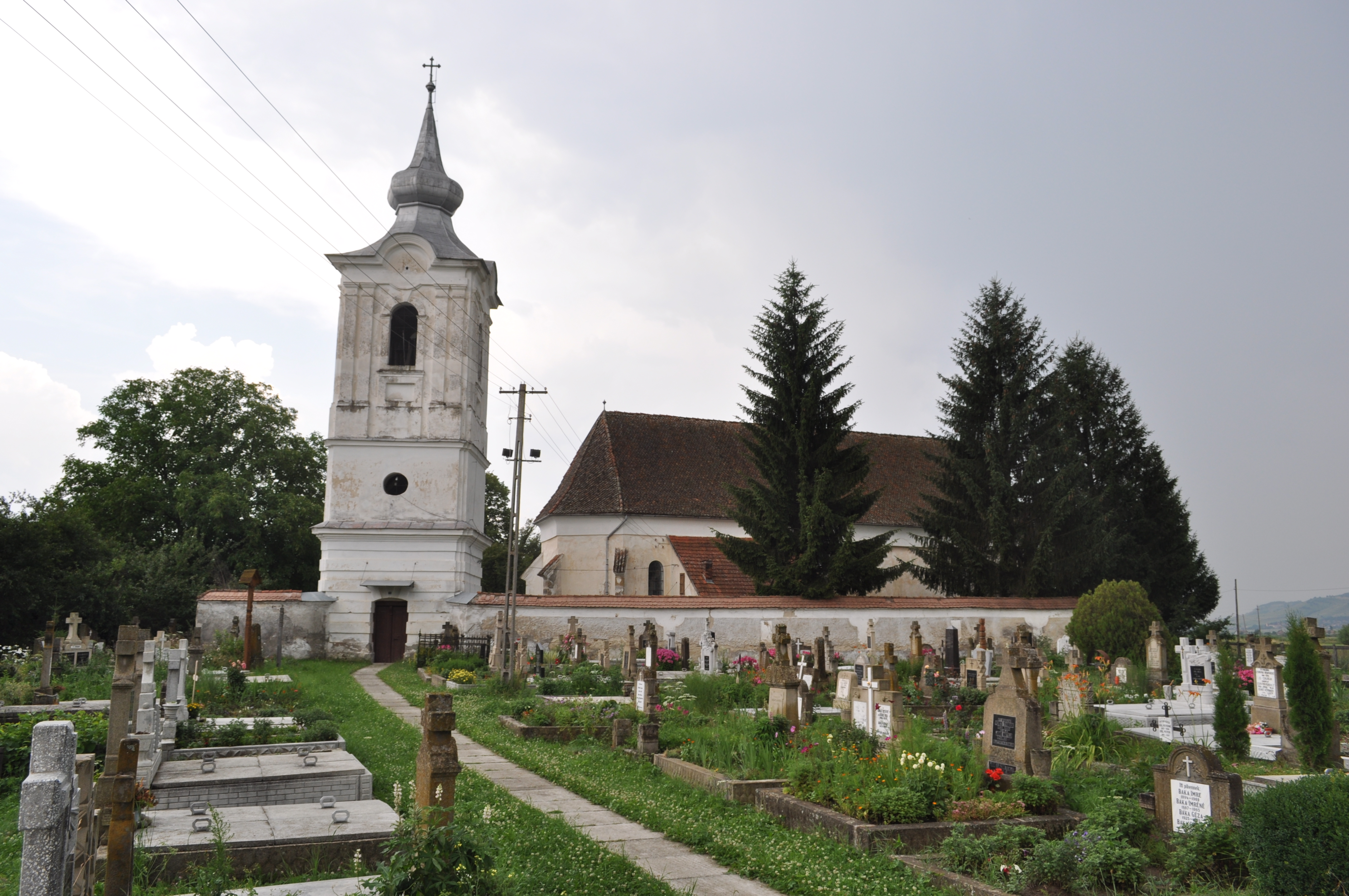 Estelnic, județul Covasna